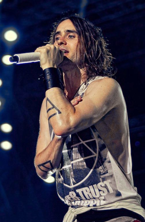 _DSC0014